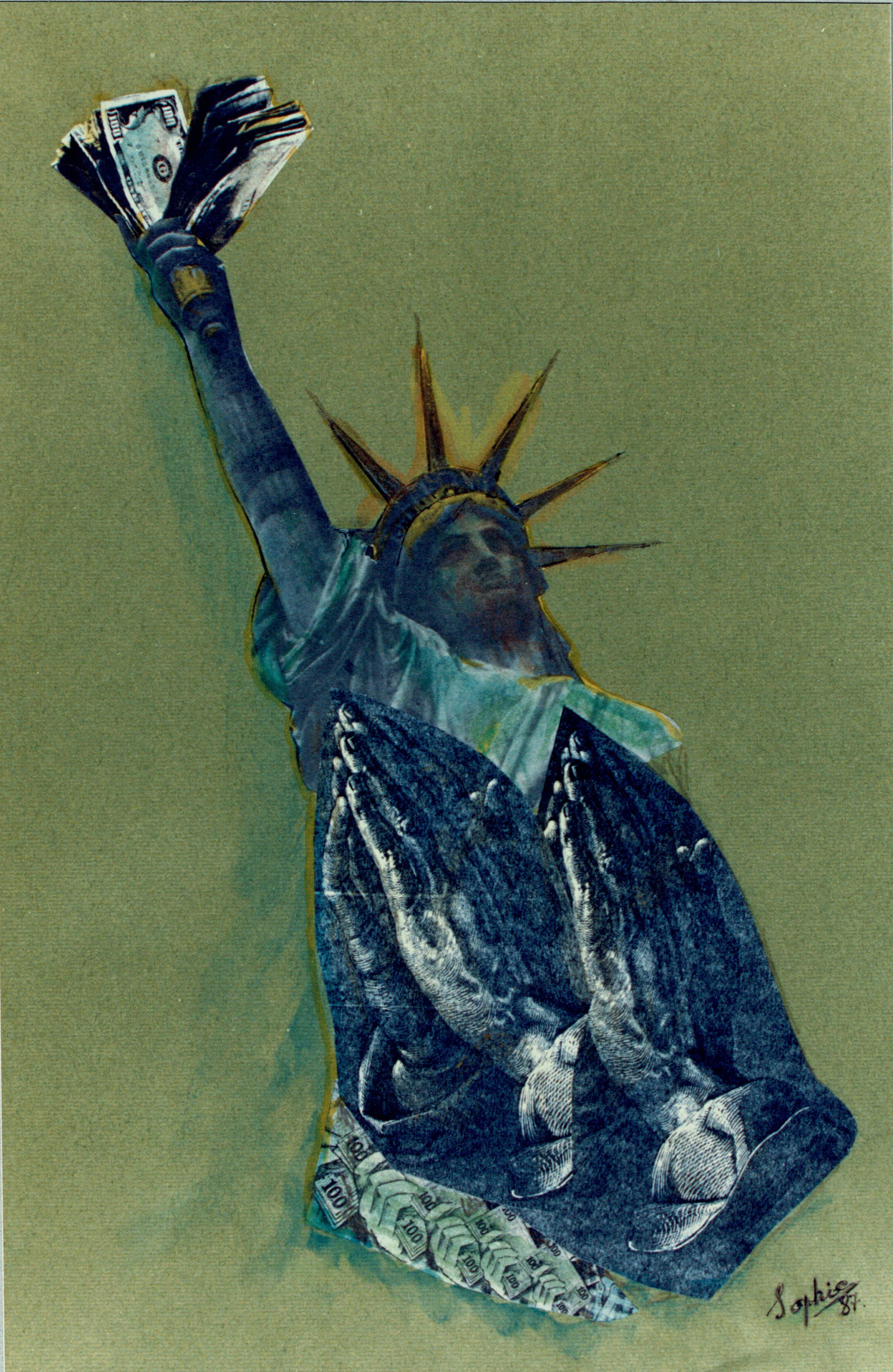 קולאז' מהסדרה "השתקפויות החירות" שהוצגה באליאנס פרנסז בחורף 1988, וביולי אותה שנה בצרפת, במוזיאון ברתולדי שבקולמר. קולאז' בתוספת אקוורל וקצת טושים.